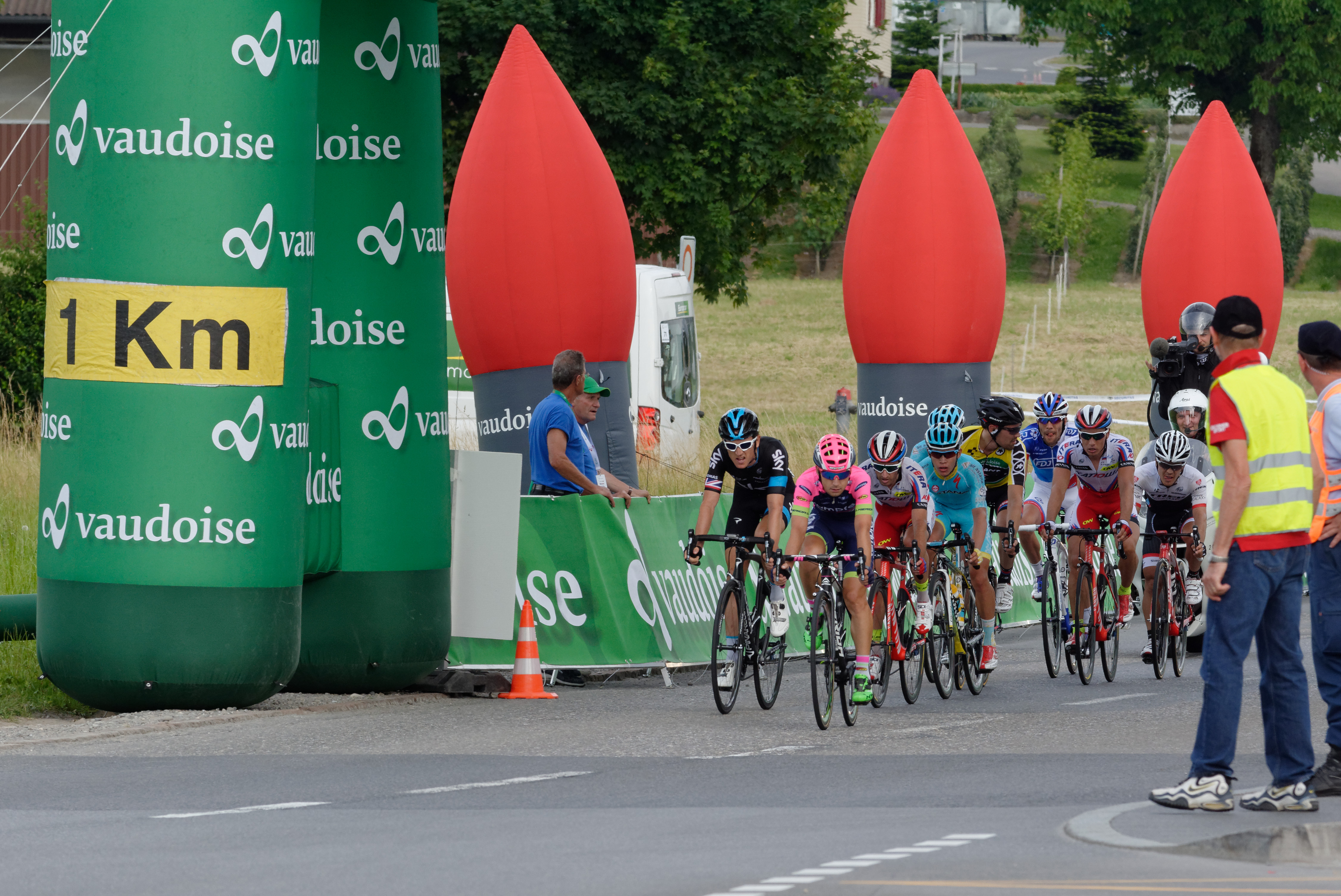 D71_0401_DxO